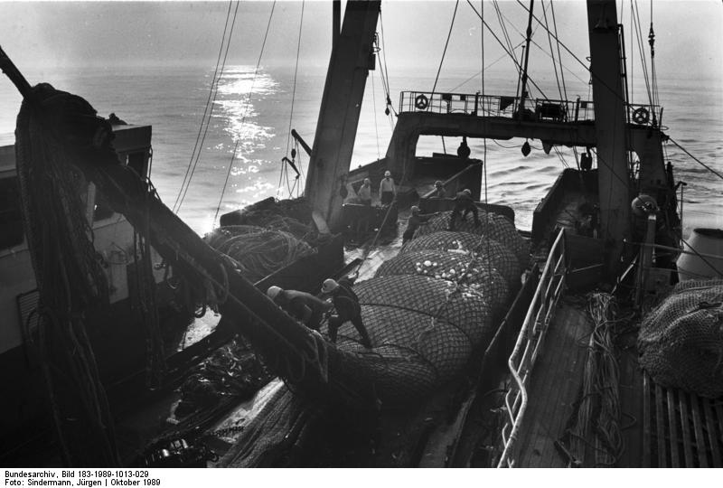 DDR, Hochseefischerei ADN-ZB/Sindermann 13.10.89 Rostock: Fischerei Das Fang- und Verarbeitungsschiff "Rudolf Leonhardt", z.Zt. im Nordatlantik übernimmt den Fisch von kleineren Fangschiffen. Die Werktätigen der Hoch-, See- und Küstenfischerei wollen trotz aller Schwierigkeiten bei der Reproduktion der Fangflotte und Verarbetungsbetriebe im 40. Jahr der DDR eine Fischproduktion von nahezu 125.000 Tonnen erreichen.